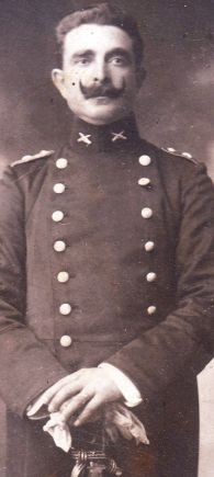 Ritratto di Attilio Felice Riva - particolare (1909-11)